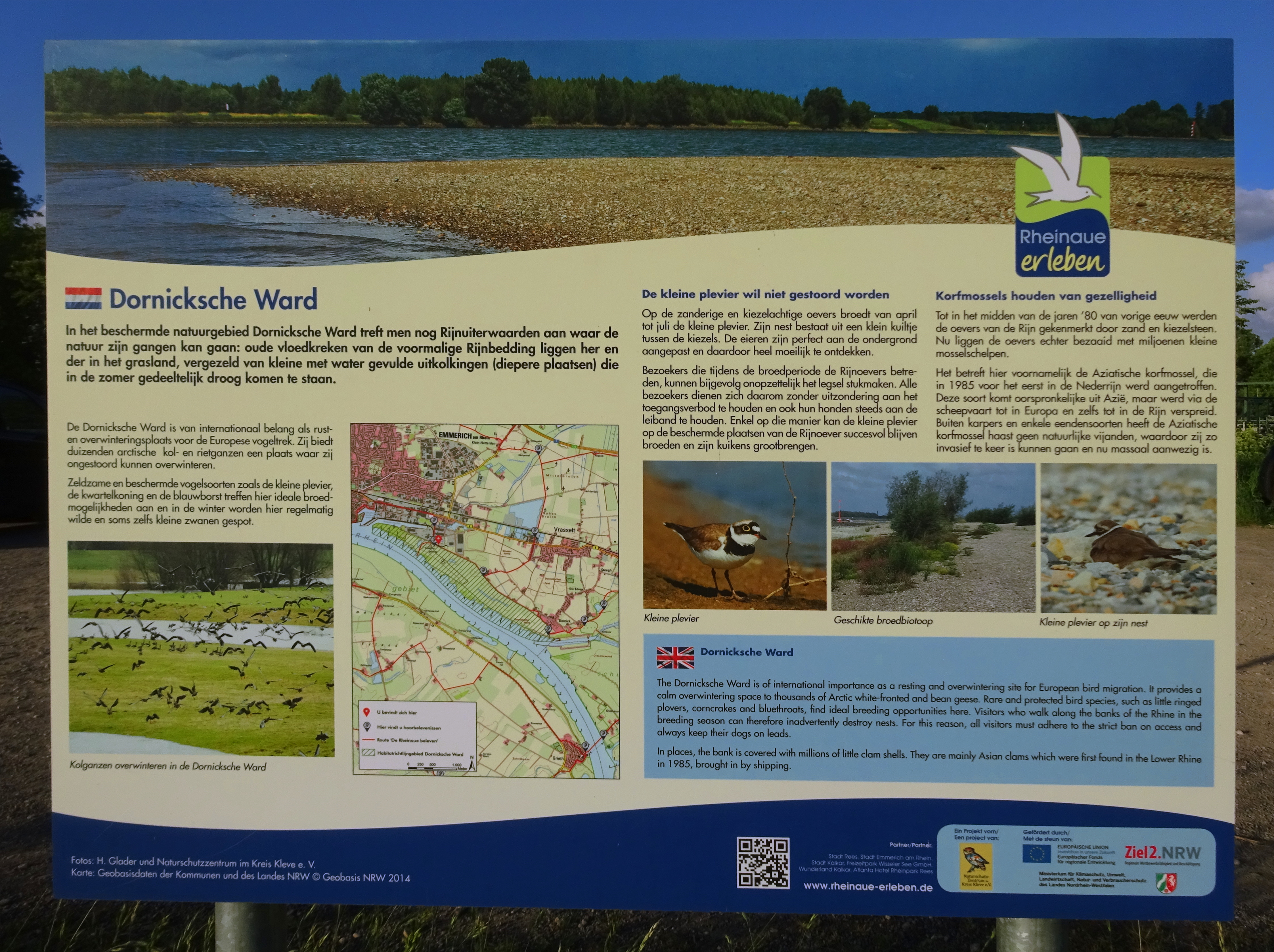 Naturschutzgebiet Dornicksche Ward